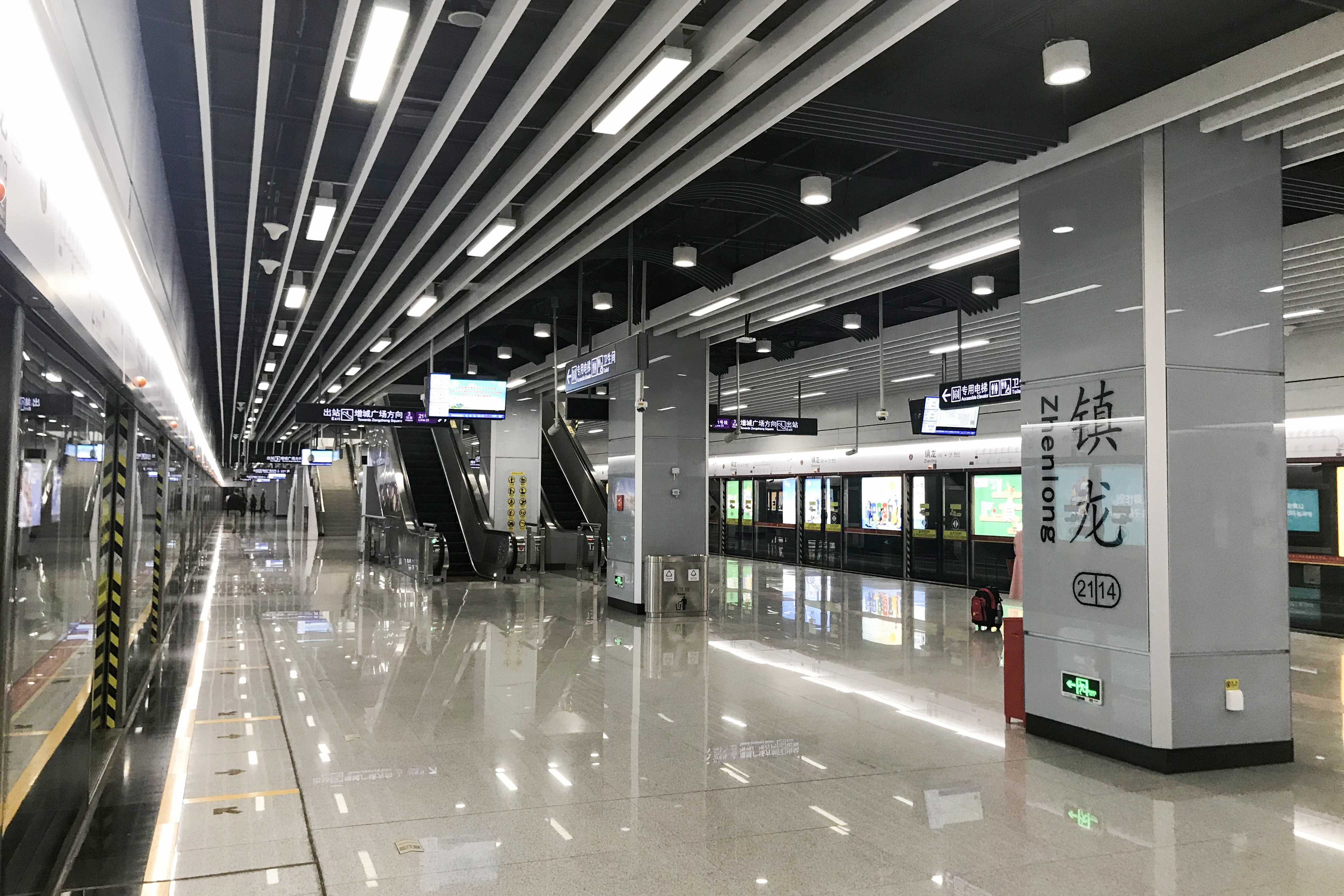 广州地铁镇龙站